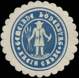 Sealing stamp Title: Gemeinde Löderburg Kreis Calbe Description: blau, weiß, geprägt Place: Löderburg size: 4x4 cm